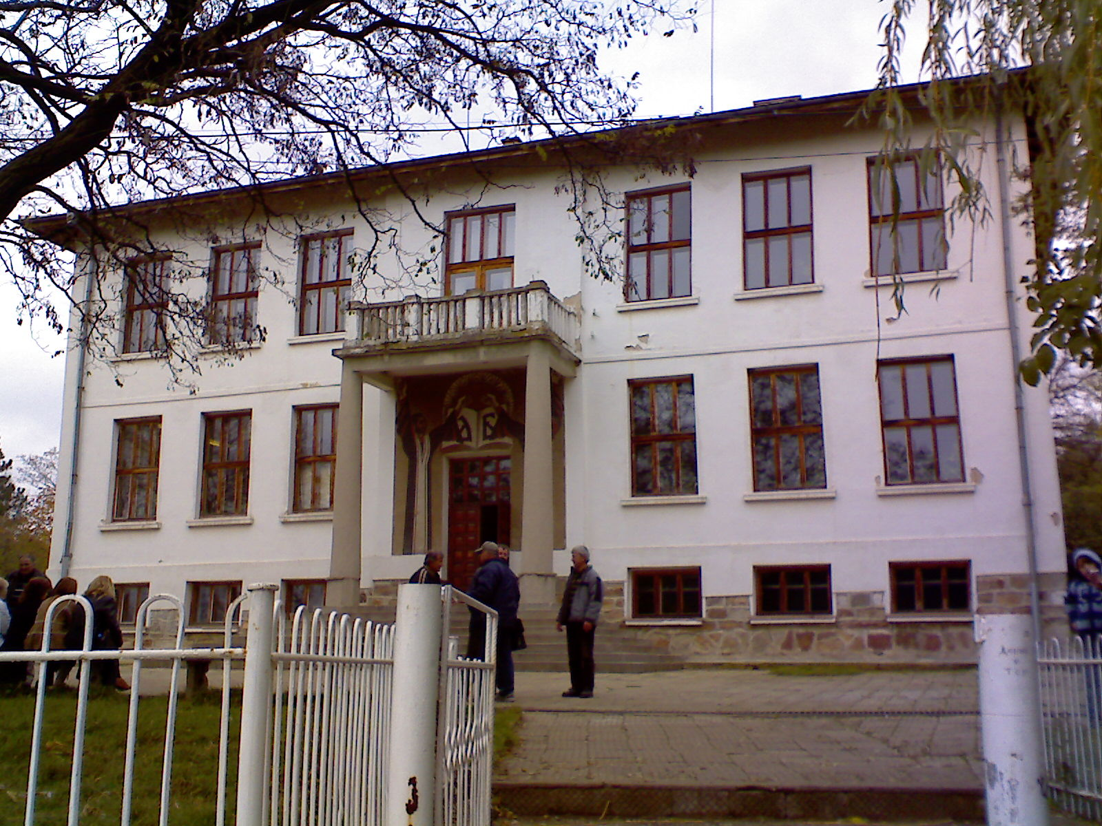 Училището в село Дрен